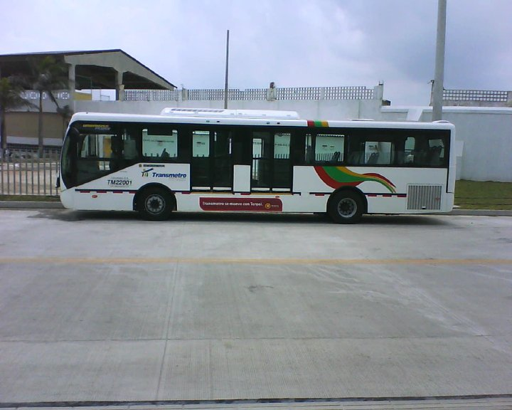 Bus padron